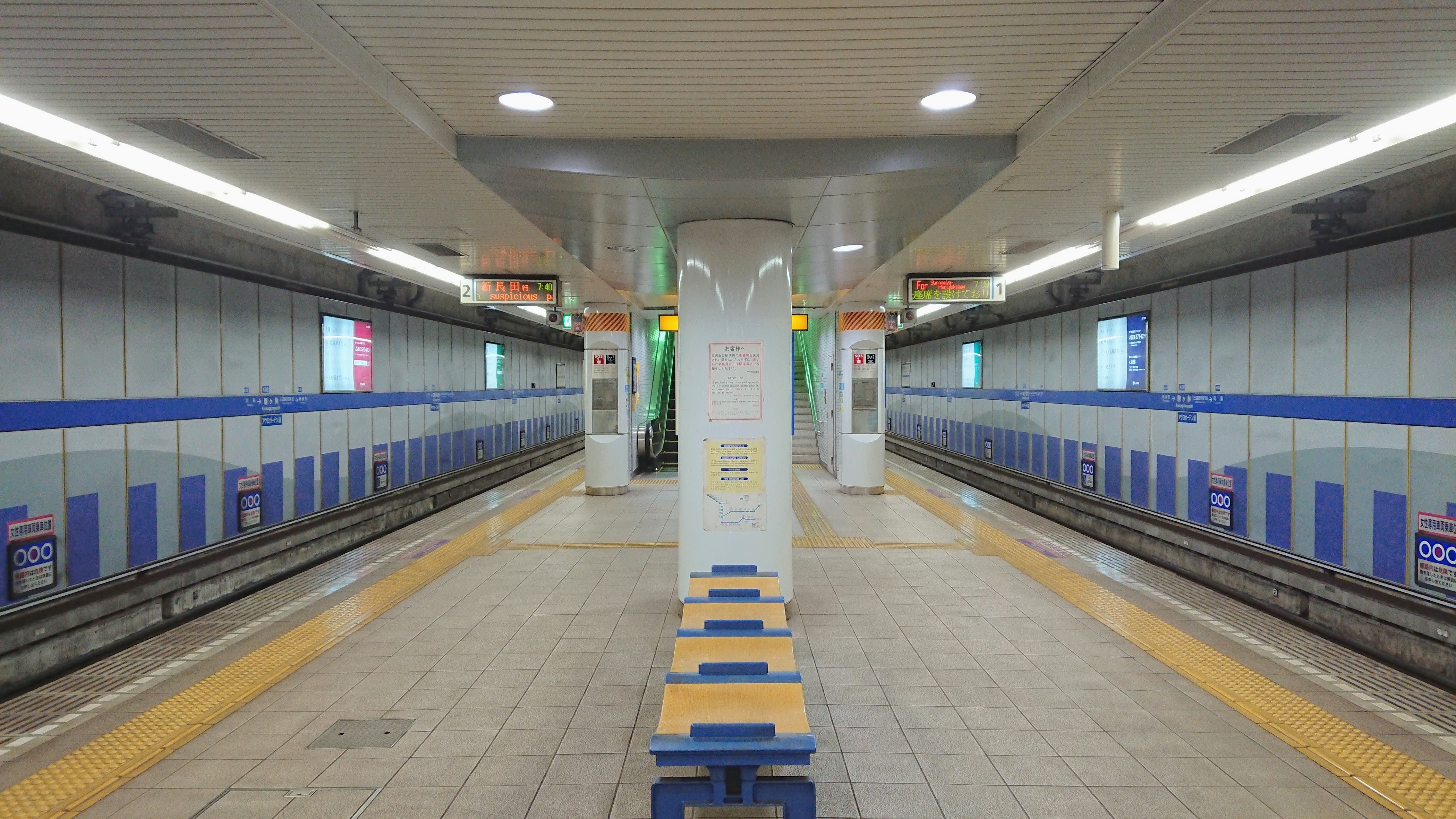 駒ヶ林駅プラットホーム